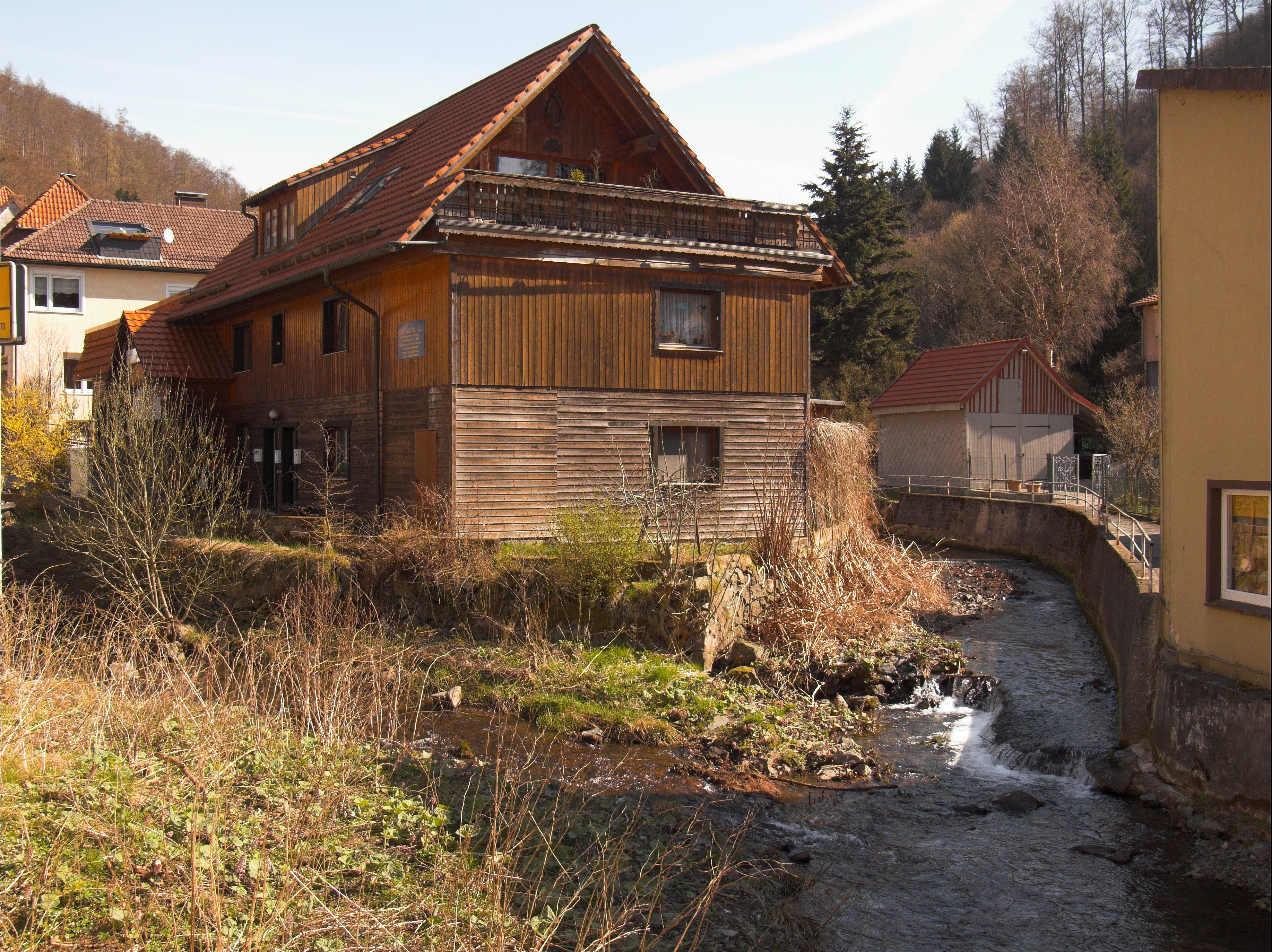 Der Sprakelbach (links) und der Wolfsbach (rechts) fließen im Ort Zorge zusammen und bilden den Fluß Zorge.